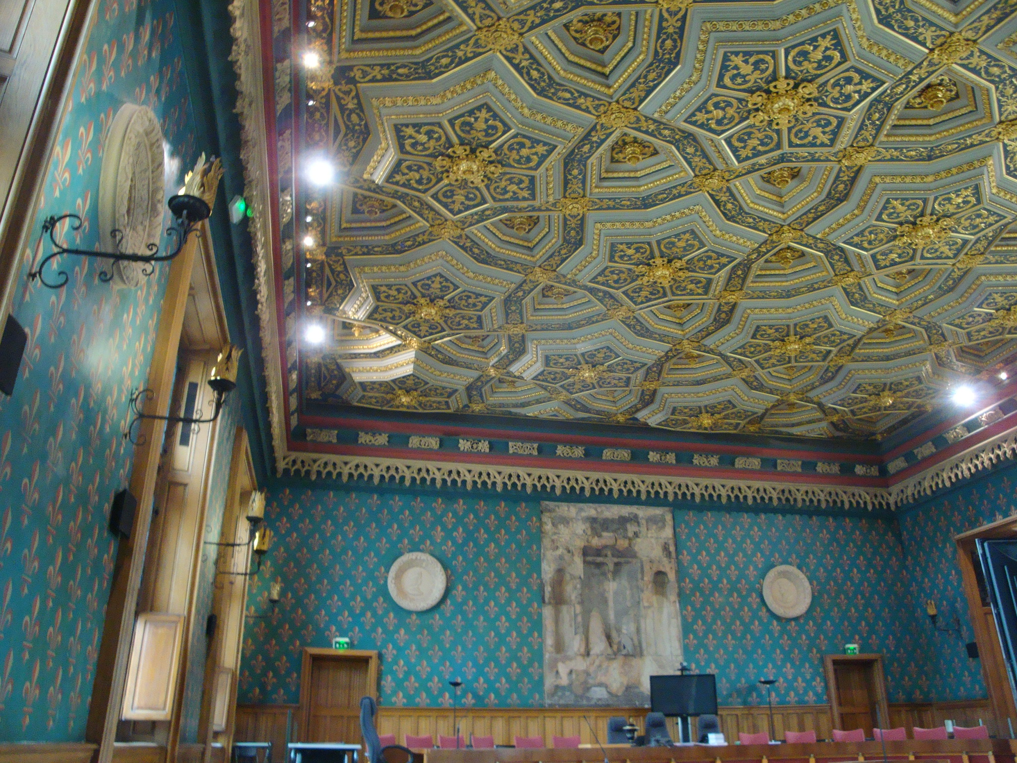 Cour d'assises Palais de Justice de Rouen